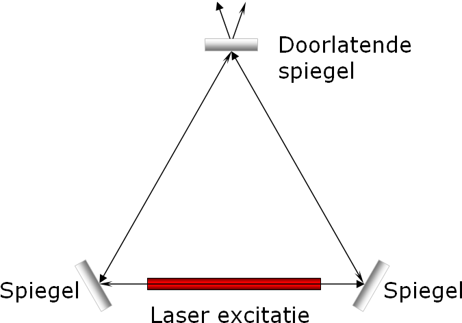 Ring laser gyro.